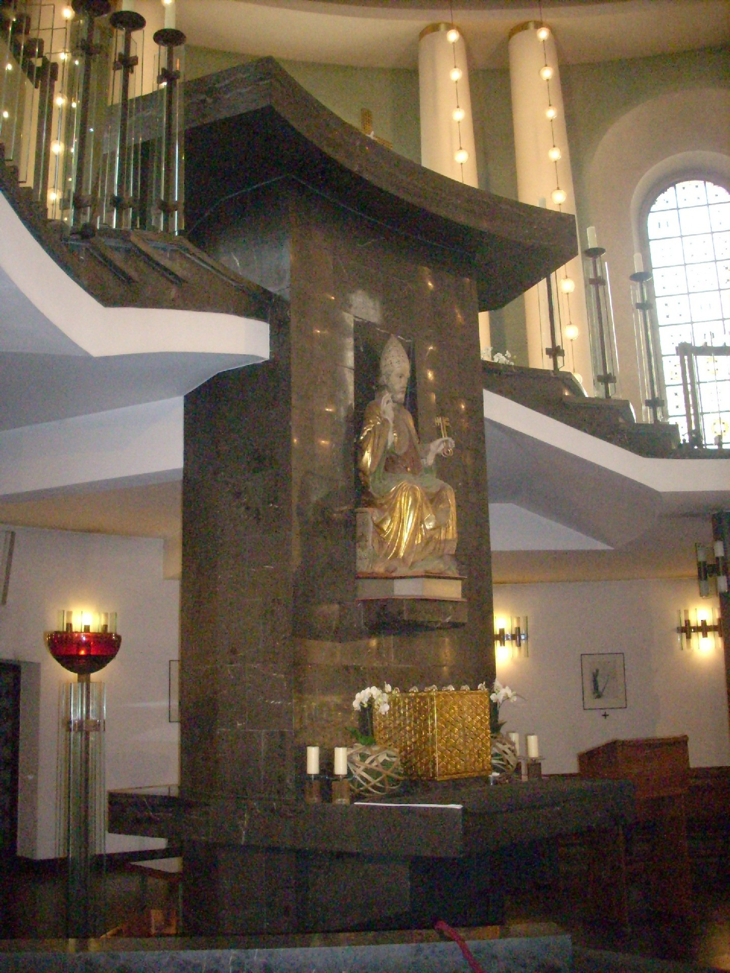 Berlin, St.-Hedwigs-Kathedrale, Altarsäule als Verbindung zwischen Ober- und Unterkirche. Die Figur des hl. Petrus ist ein Geschenk Papst Johannes Pauls II. anlässlich seines Besuches der Kathedrale. Das Tabernakel ist von Schwerdt&Förster, Aachen, 1963.